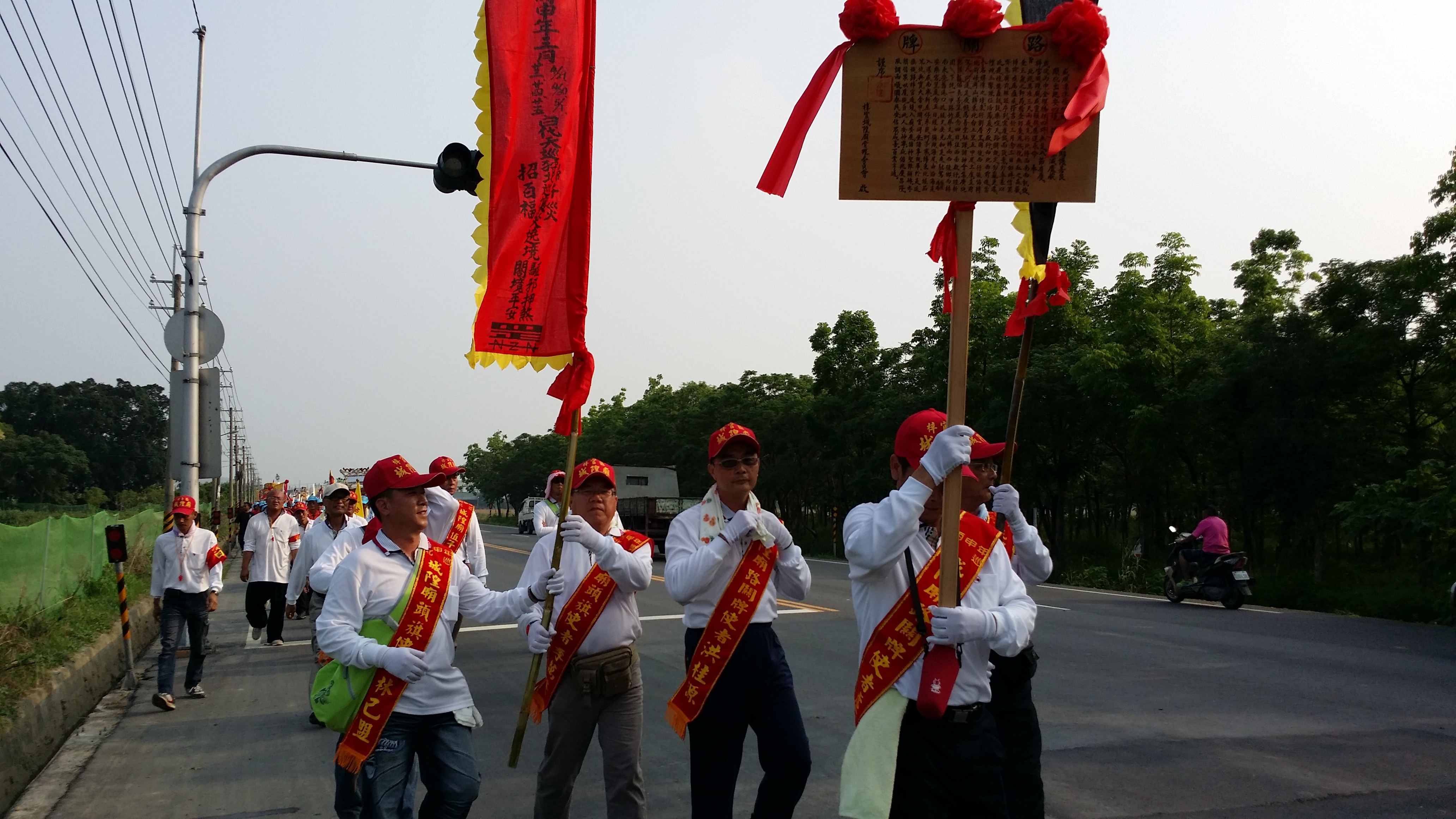 廟宇遊行隊伍最前端常可見到路關牌與頭旗，路關牌用以昭告此次繞境或進香遊行的路線，同時也可以維持出巡隊伍的完整與莊嚴。長距離的進香遊行為減輕人員負擔，也有以車輛代替手持的形式，稱為路關車。 畫面中的路關牌與頭旗為高雄梓官城隍廟所有。